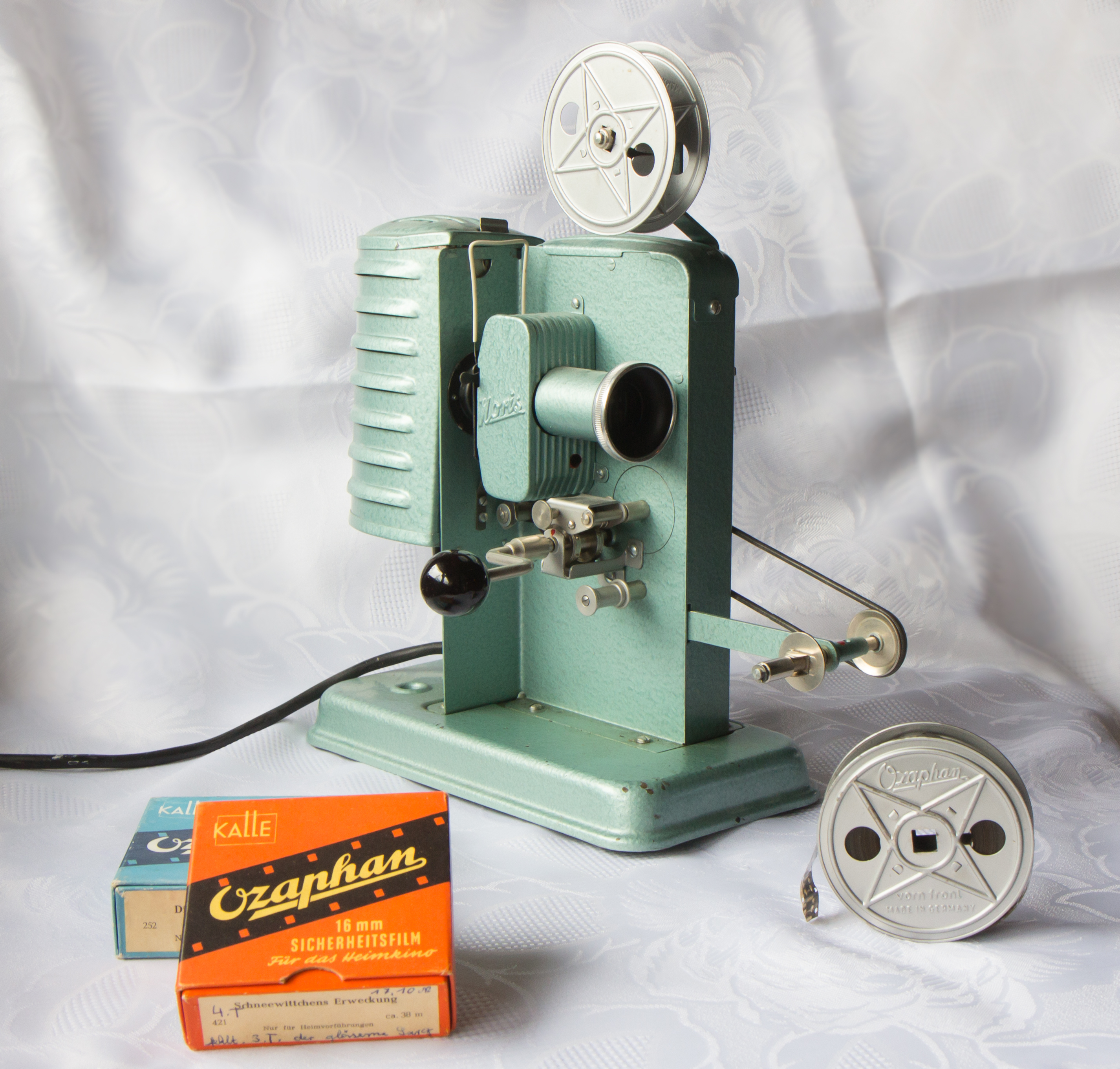 Noris Magica 16mm Filmprojektor mit Handkurbel für Ozaphan-Film. Ozaphan-Sicherheitsfilm "Schnewittchens Erweckung" und "Die Rache der Köchin" (aus urheberrechtlichen Gründen nur die Rückseite der Schachtel)